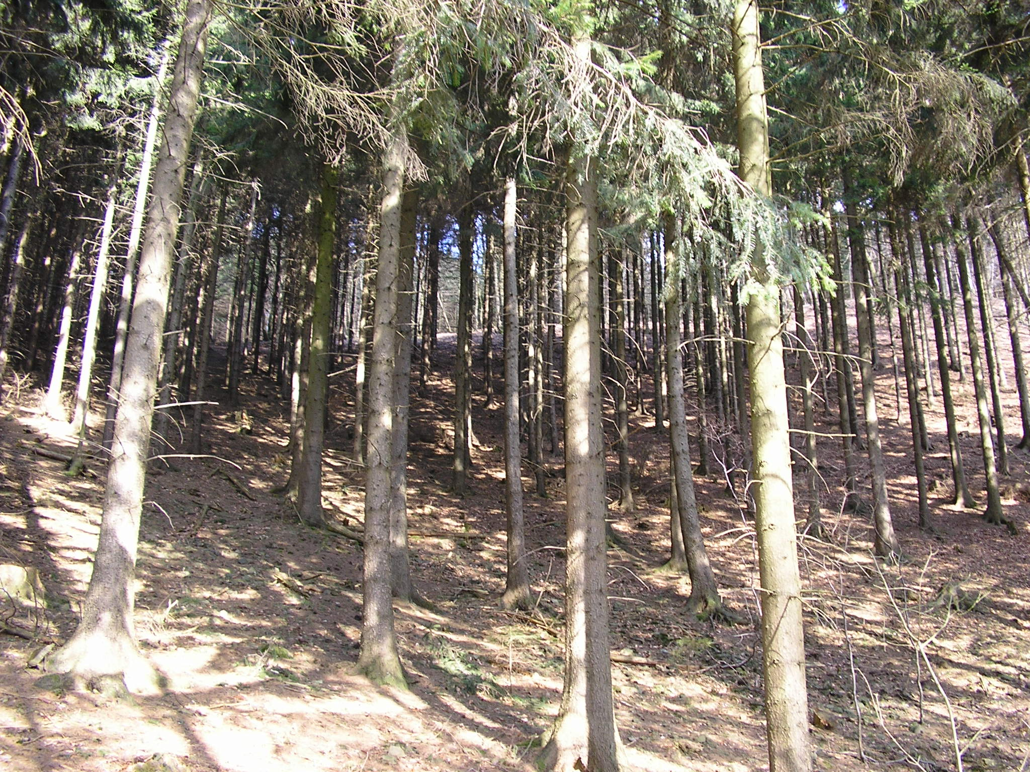 Bergwald in Lübbecke Sonstiges: FalkOberdorf